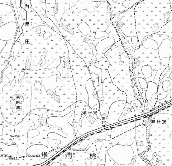 中文（台灣）: 臺灣堡圖－桃澗堡內壢庄截圖。本圖1904年出版，已超過版權保護期。